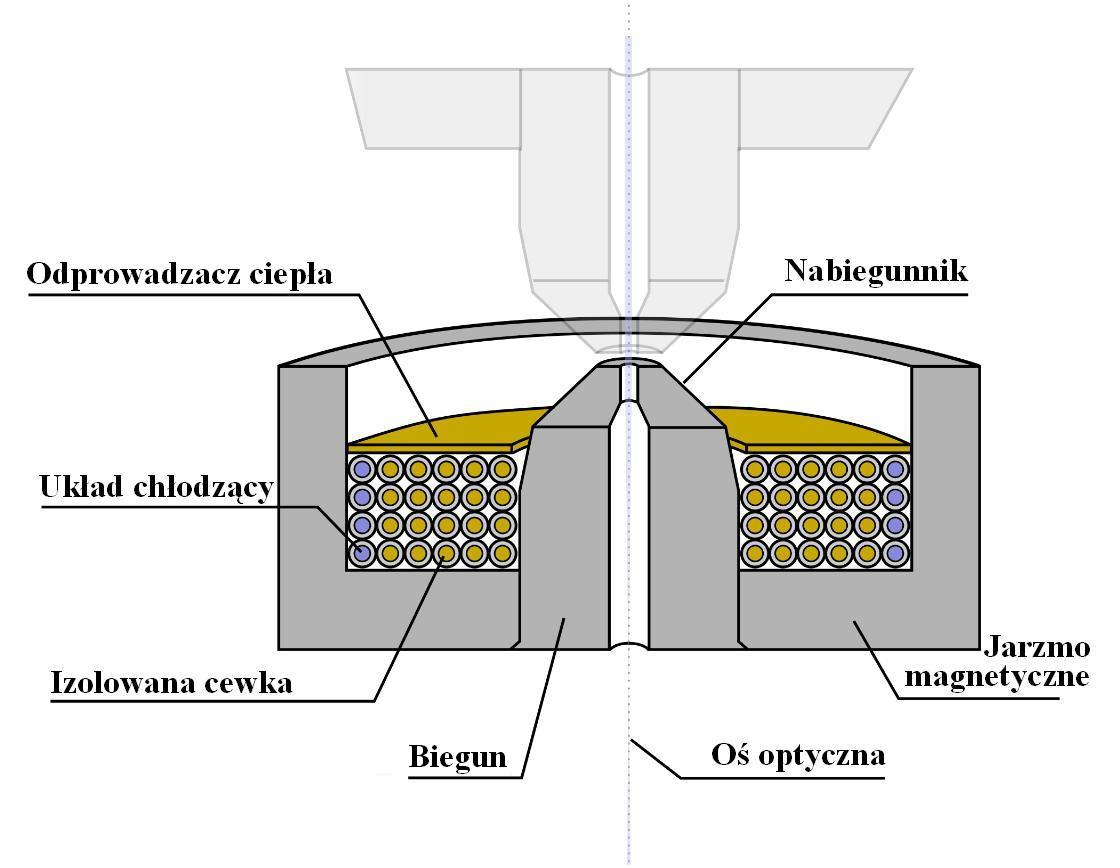 Schemat budowy soczewki elektromagnetycznej wykorzystywanej w mikroskopii elektronowej